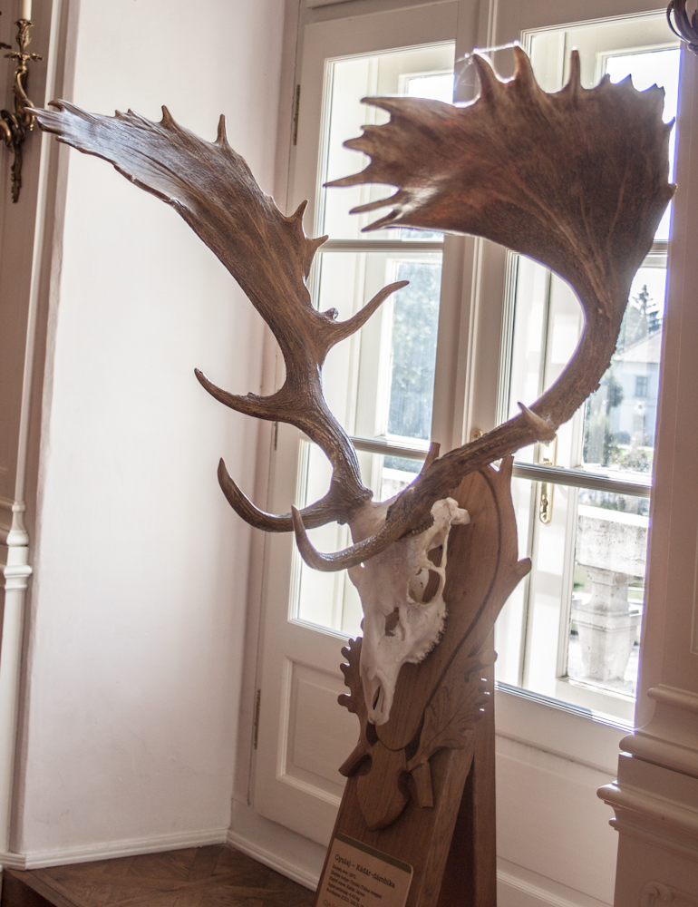 Gyulaj_-_Kádár_Buck, location - Gyulaj (Tolna County); hunter - János Kádár; weight 4,42 kg; CIC points - 220,31 IP; world record 1972-1992label QS:Len,"Gyulaj_-_Kádár_Buck, location - Gyulaj (Tolna County); hunter - János Kádár; weight 4,42 kg; CIC points - 220,31 IP; world record 1972-1992" label QS:Lhu,"Gyulaj - Kádár dámbika, Gyulaj, Tolna megye, Kádár János, tömeg - 4,42 kg, CIC pontszám 220,31 IP, világrekord 1972-1992"